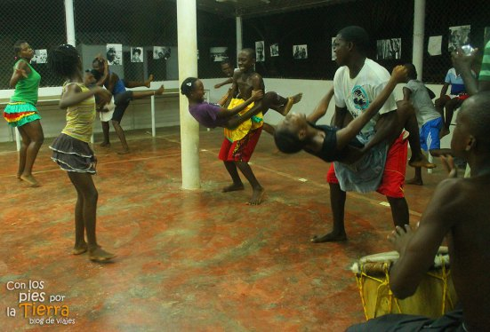 Bailes tipicos colombia